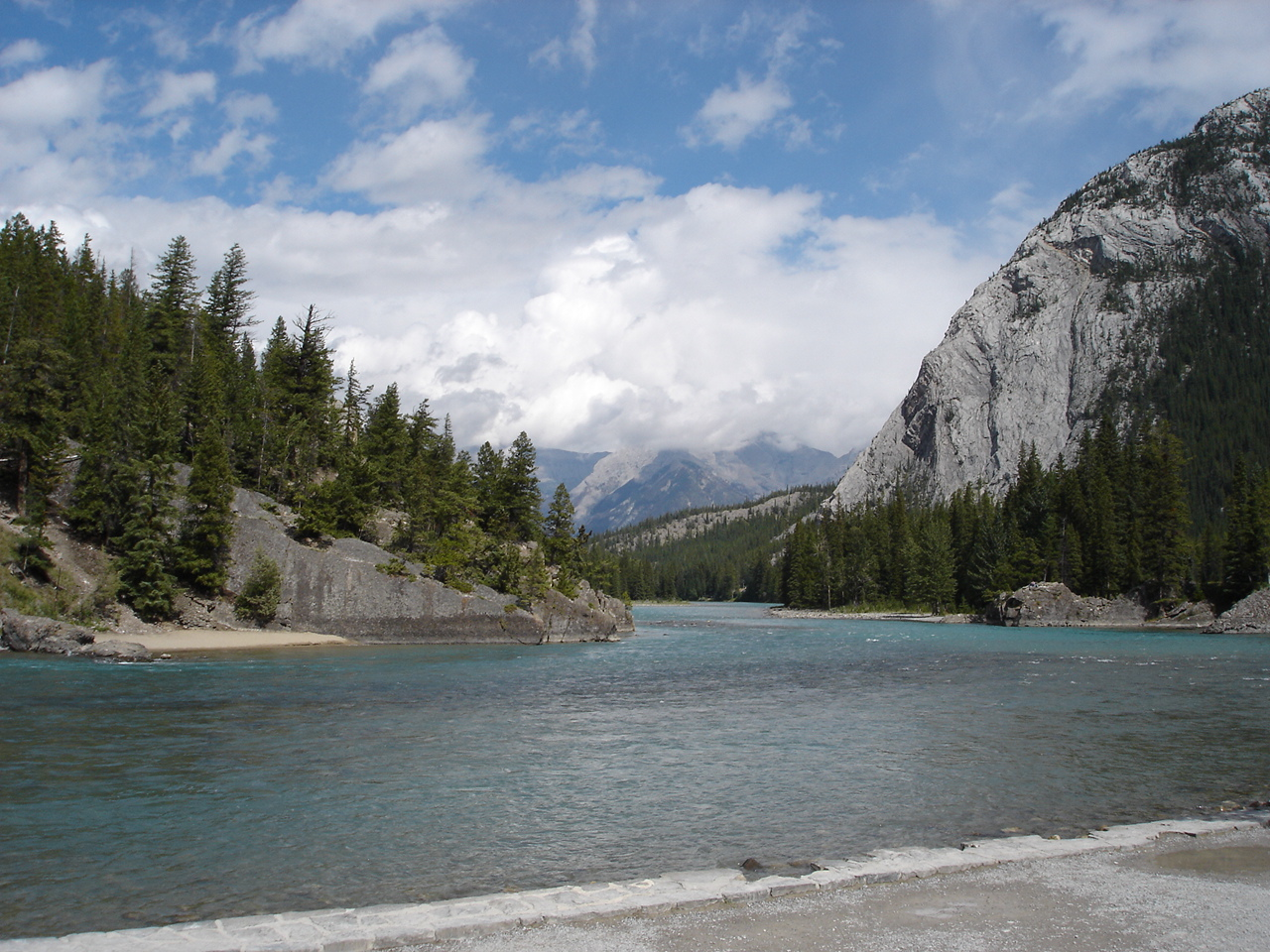 Bow River.